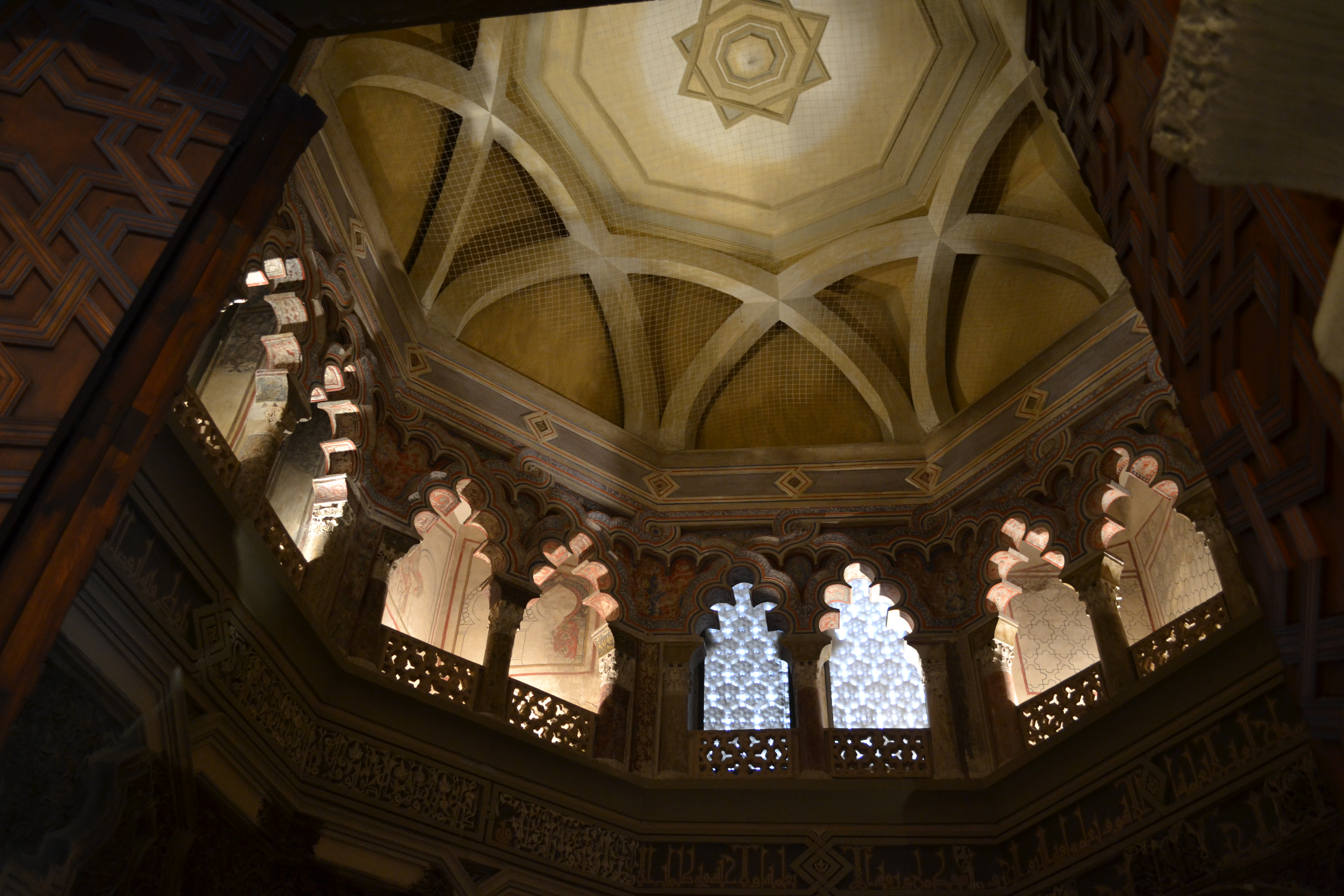 Galería superior de arcos con restos pictóricos y cubierta del llamado Oratorio, en realidad una mezquita octogonal para el uso privado del rey y su corte.La cubierta original era calada y translúcida, pero se desconoce su forma. La actual, reversible, es obra del aquitecto íñiguez Almech. Palacio del Aljafería, Zaragoza.